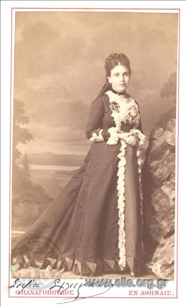 София Шлиман в молодые годы